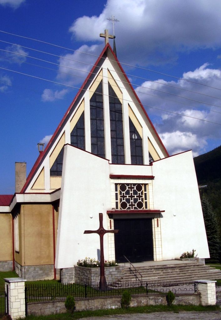 Kościół pw. św. Maksymiliana w Zalesiu (gmina Kamienica)